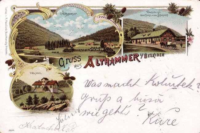 Staré Hamry, pohledníce odeslaná roku 1901